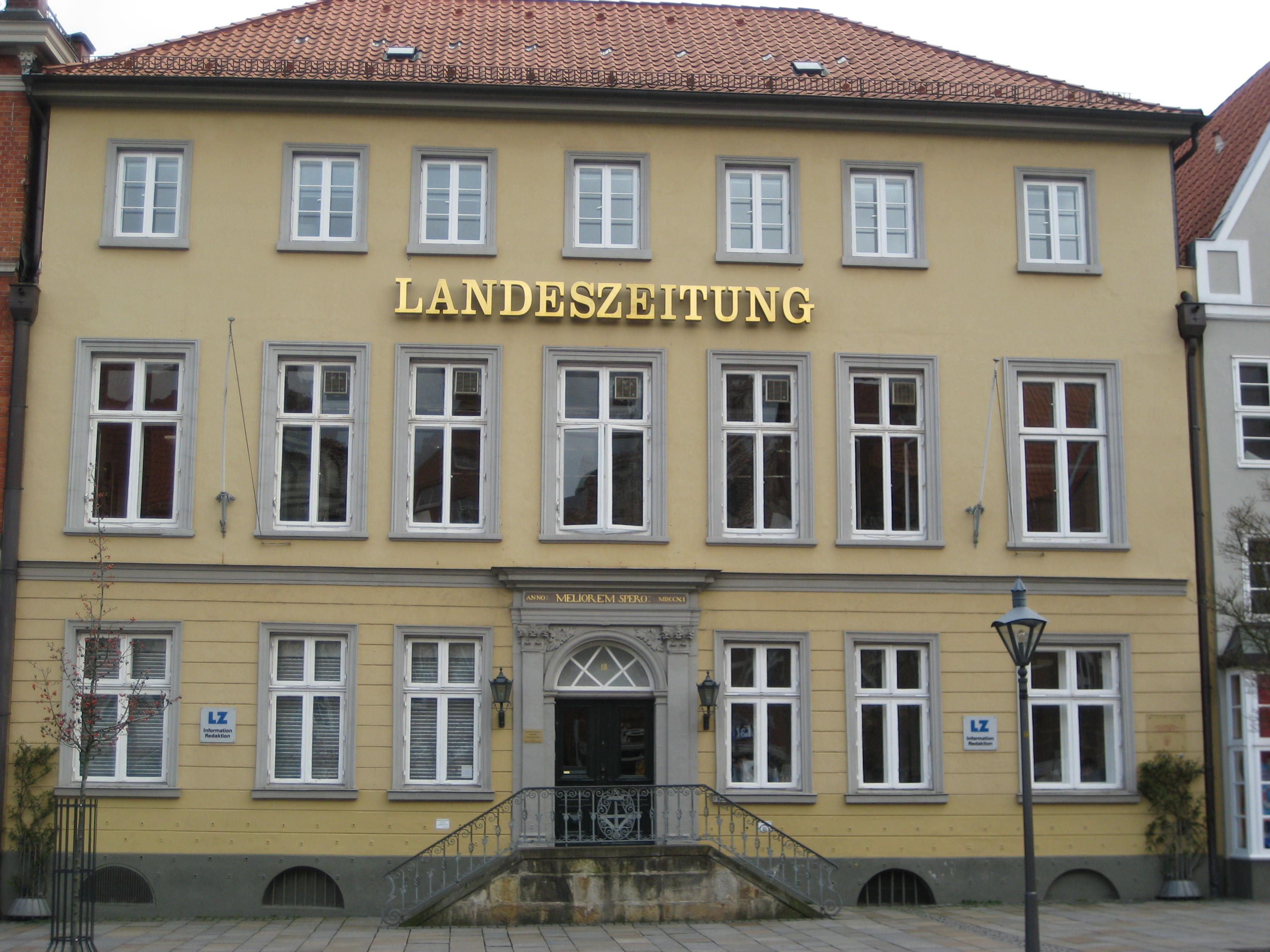 Gebäude der Landeszeitung für die Lüneburger Heide in Lüneburg, Am Sande